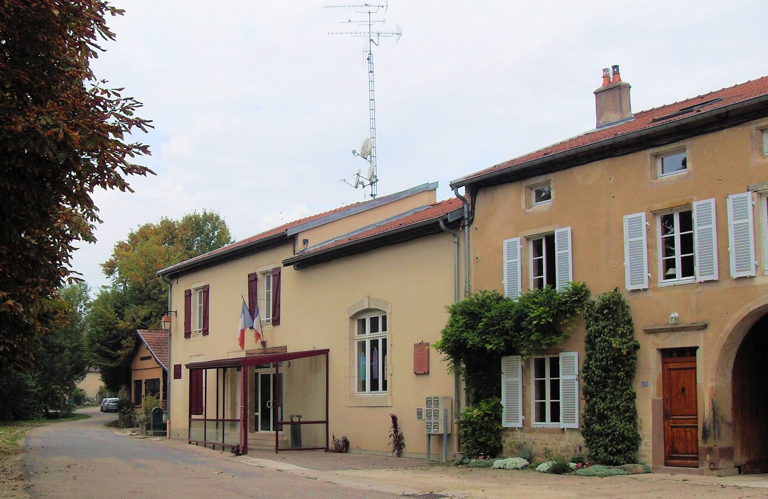 La mairie de Xirocourt